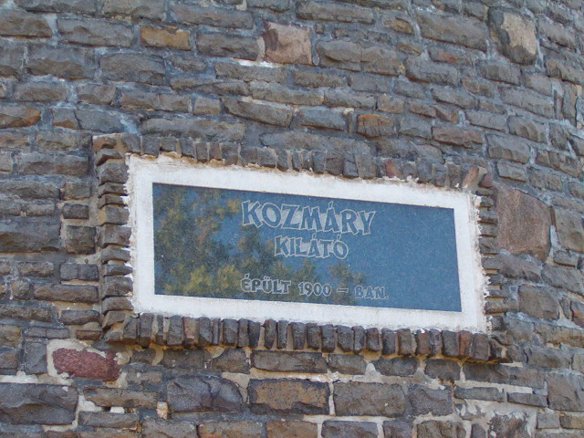 information table on Kozmáry-kilátó near Mátrafüred